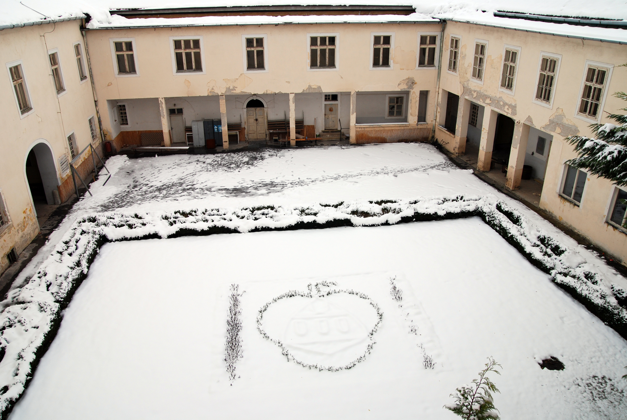 Kaštieľ a anglický park v Malinove